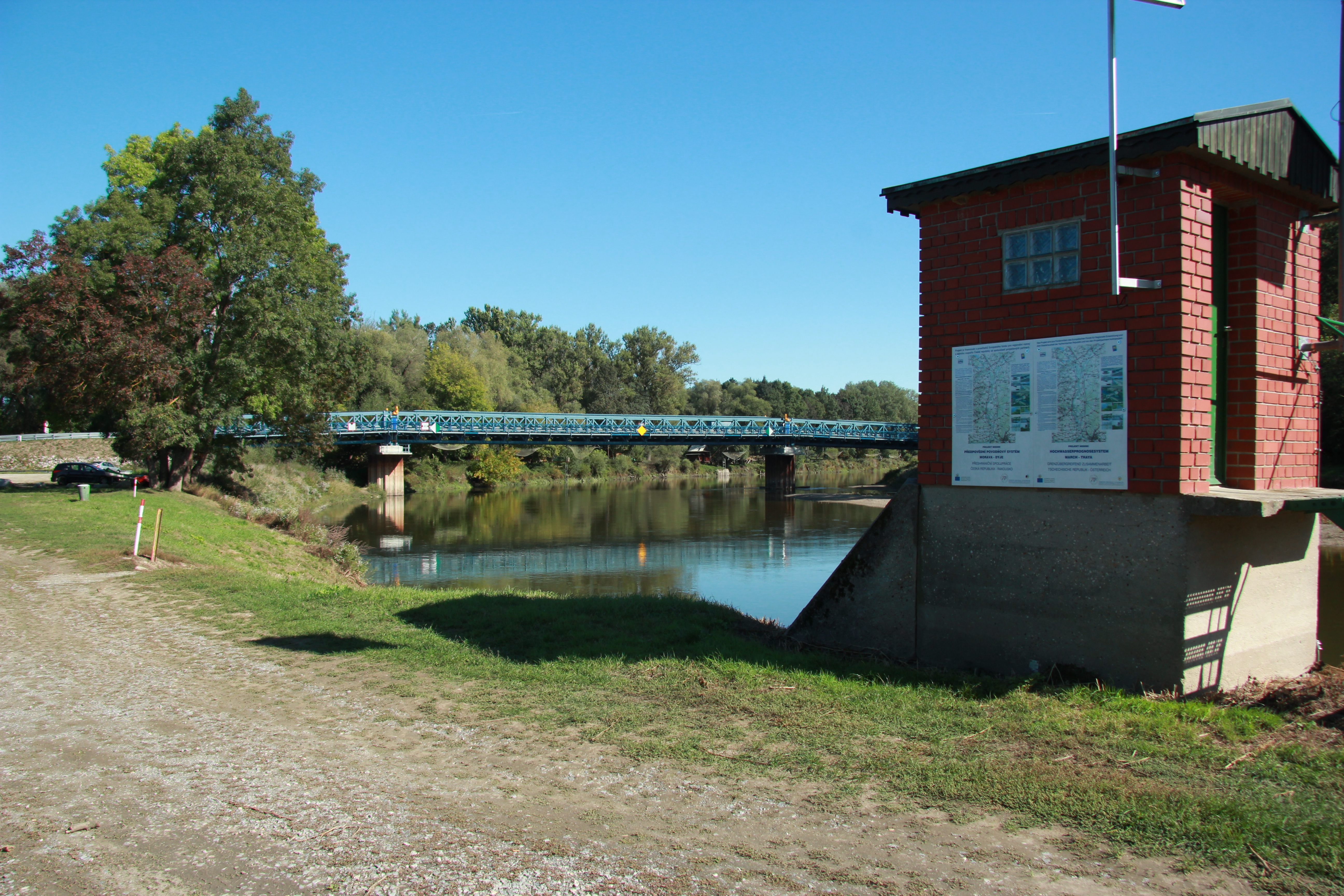 Marchbrücke im Bereich des Grenzüberganges Hohenau an der March und Moravský Svätý Ján